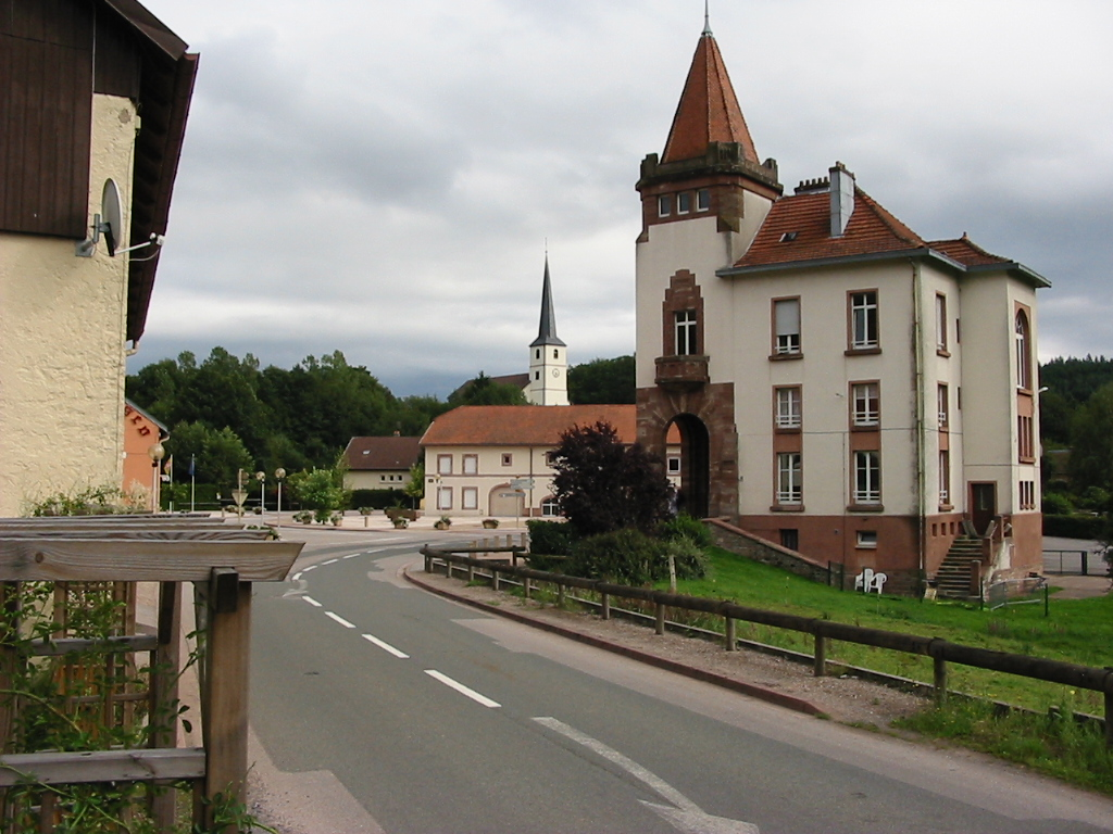 Taintrux Le Centre : la mairie et l'église Commune du canton de Saint-Dié-Ouest (Vosges) Photo personnelle du 28 août 2004. Copyright © Christian Amet